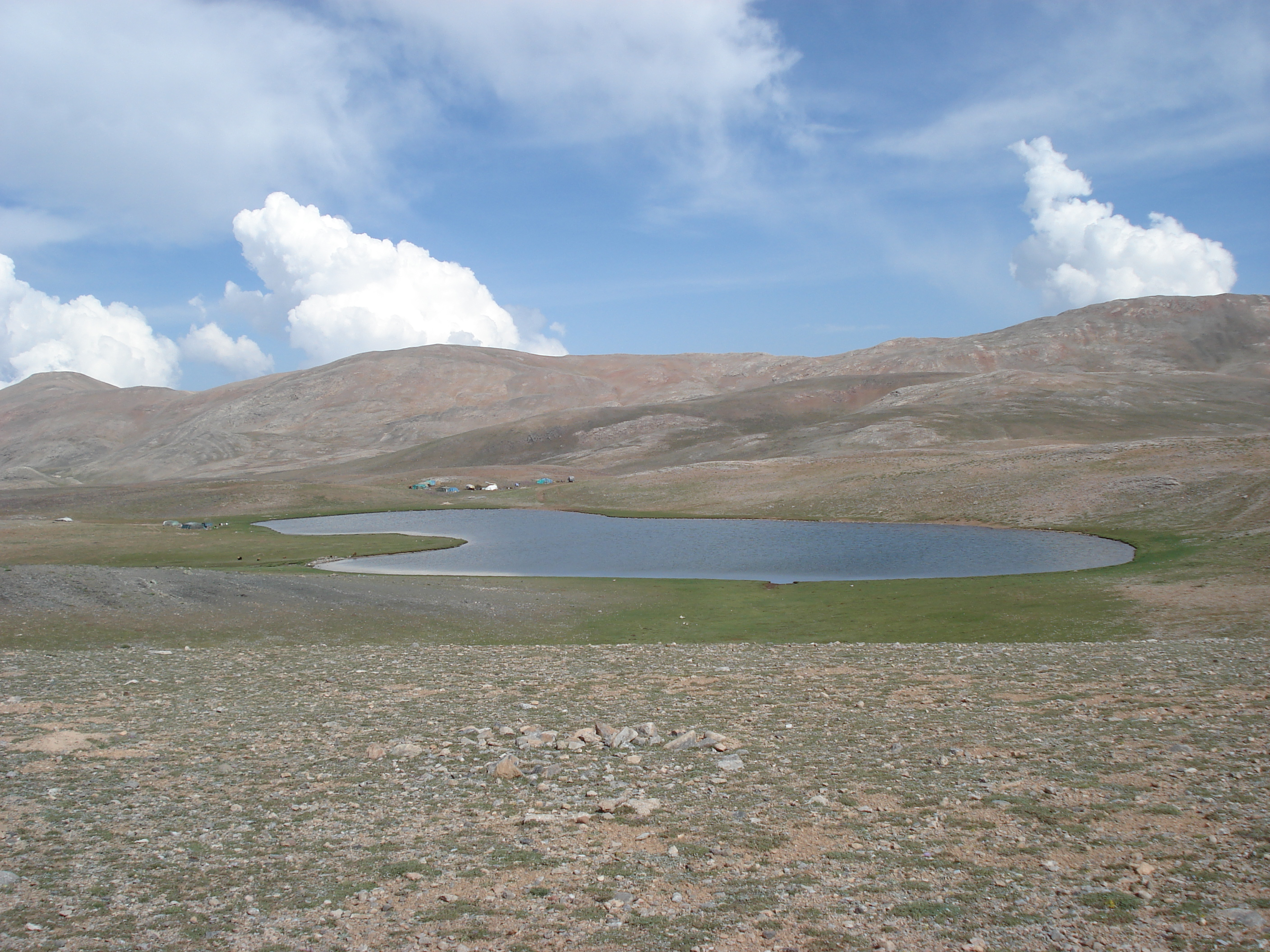 Mersin ili Çamlıyayla İlçesinde bulunan Yazıgöl'den görüntü.